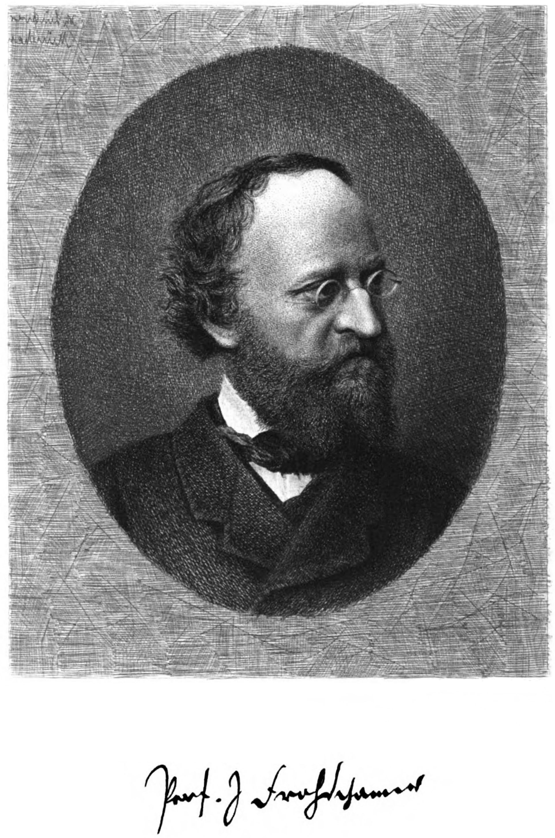 Porträt: Jakob Frohschammer. Radierung von Johann Lindner in München. In: Nord und Süd. Eine deutsche Monatsschrift. Herausgegeben von Paul Lindau. S. Schottländer, Breslau, 67. Band. 1893